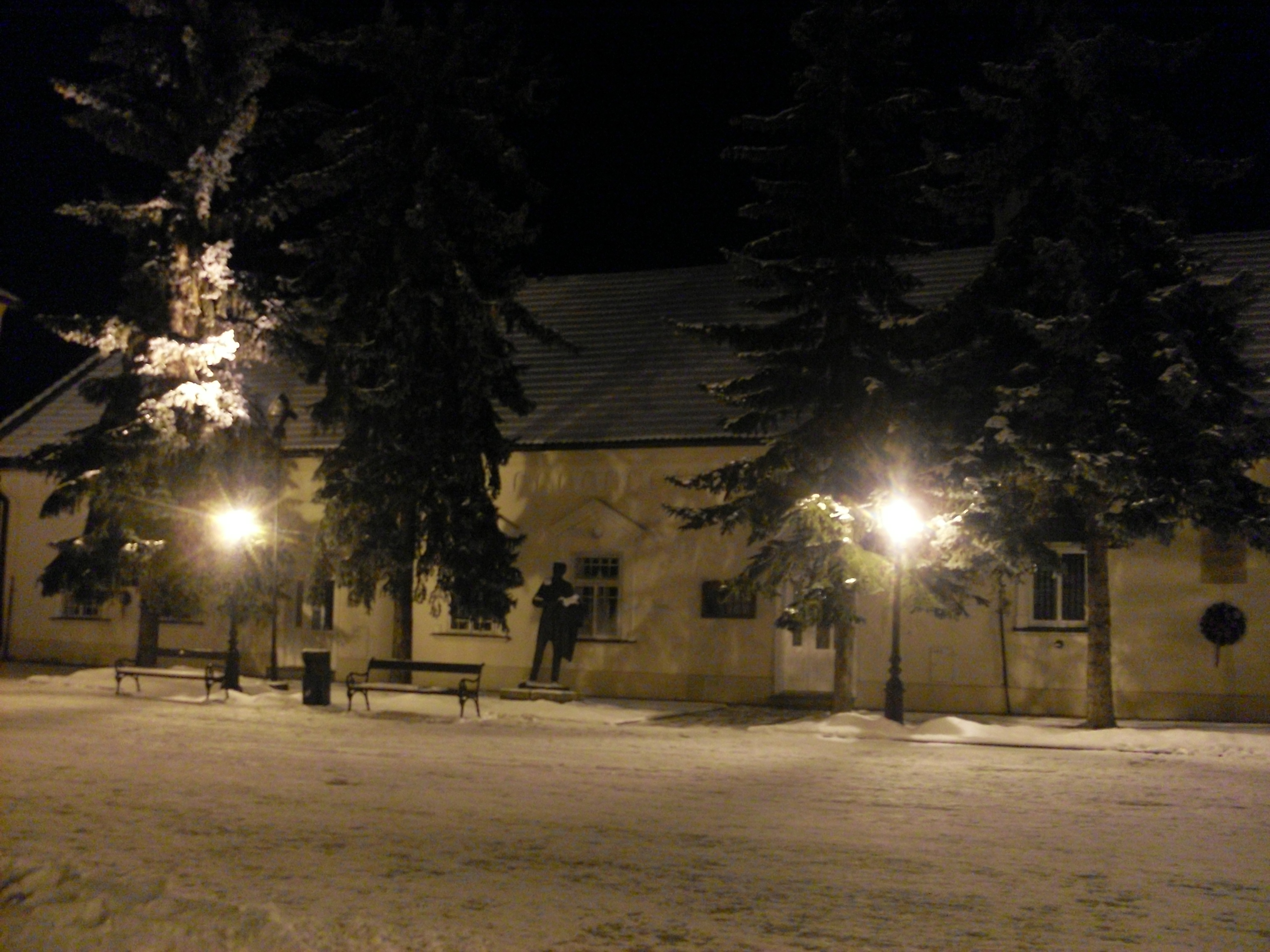 Budova Tatrín v Liptovskom Mikuláši